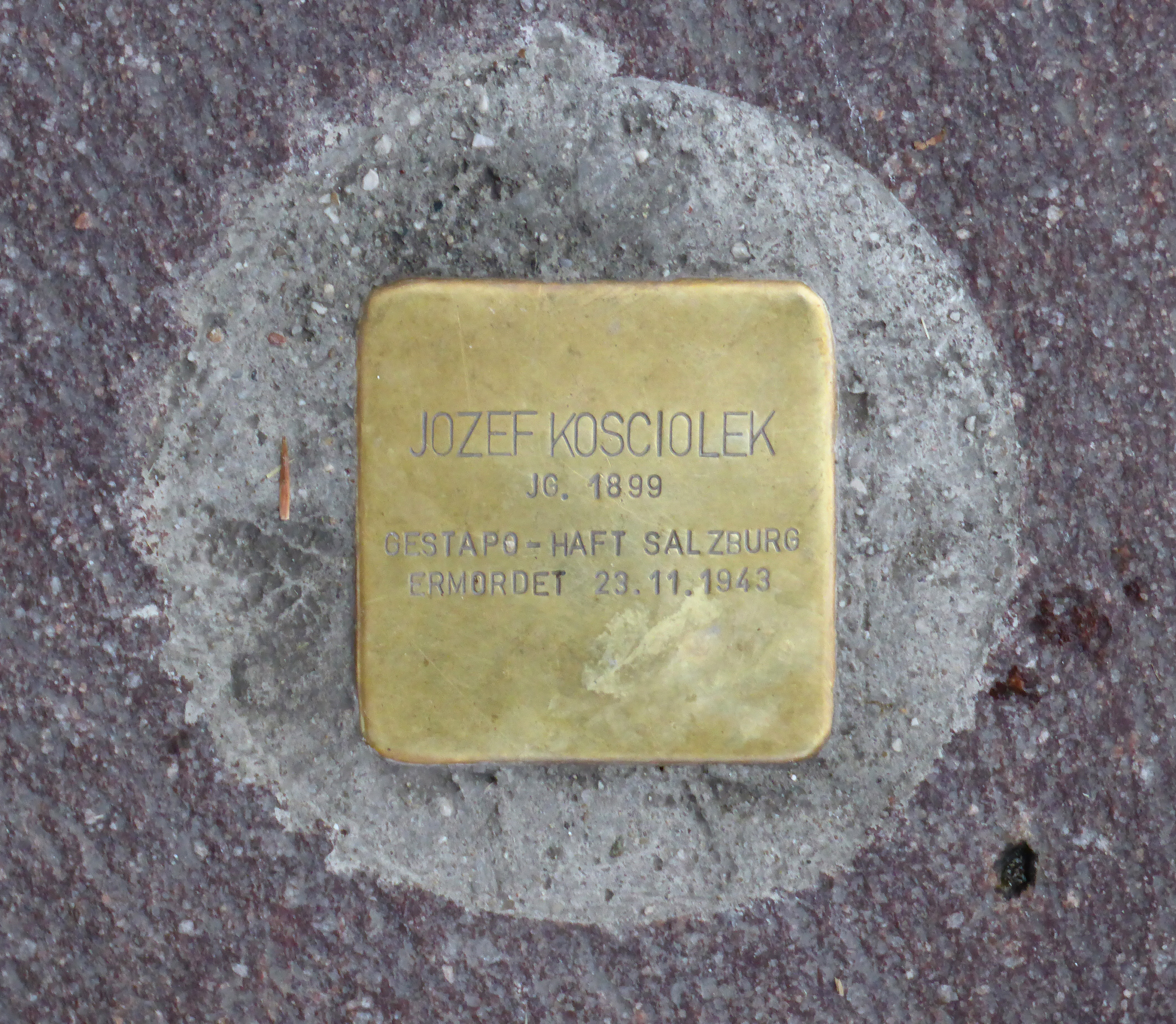 Stolpersteine Salzburg, Verlegestelle Franziskanergasse 5 (Franziskanerkloster Salzburg).